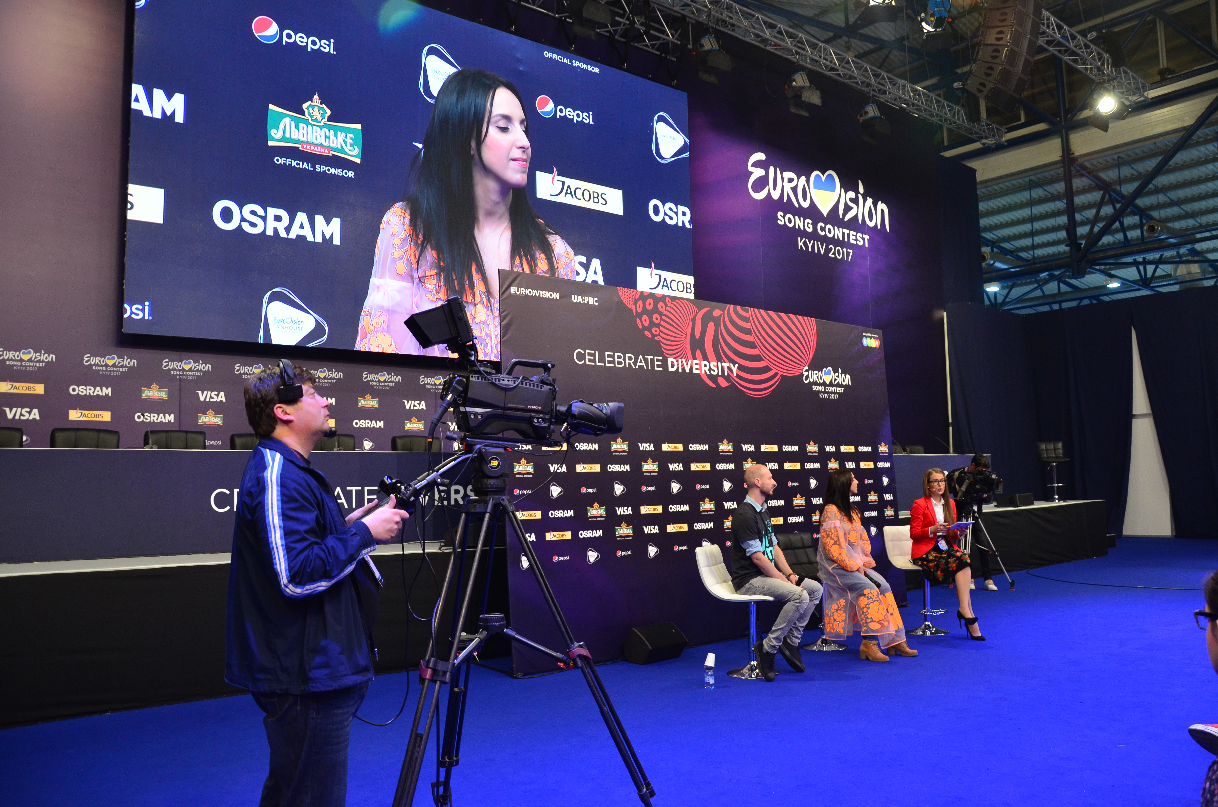 10 травня. У прес-центр головної арени Євробачення-2017 відбулась прес-конференція Джамали.